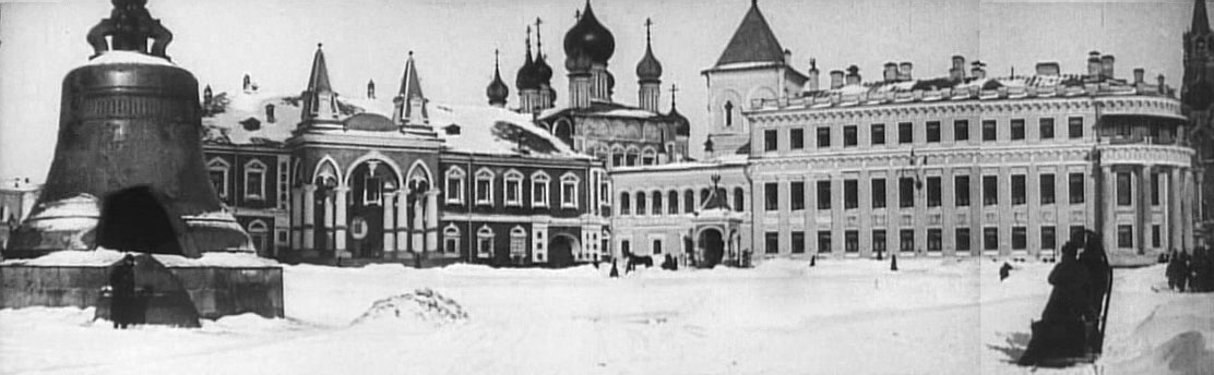 Ивановская площадь Московского Кремля Слева направо: Царь колоколь, Чудова монастырь с Митрополичим корпусом, храм Благовещения и Алексия Митрополита, Малый Николаевский двроец. Кадры из фильма "Москва под снегом", 1908 год.